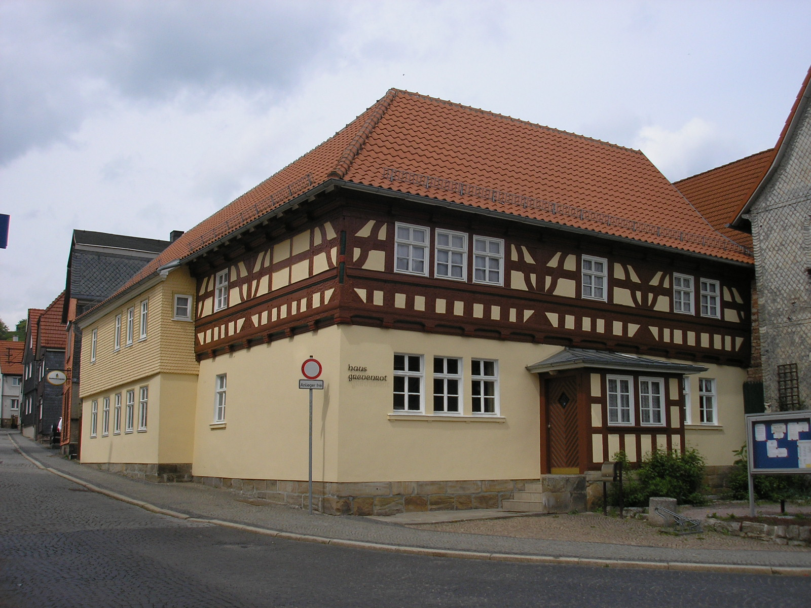 Das "Haus Grevenrot" in Gräfenroda (Thüringen). Es ist das älteste Haus im Ort und war früher auch das Rathaus.